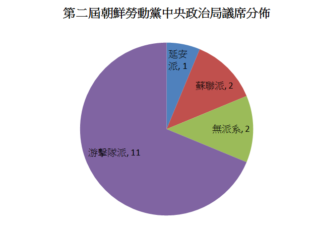 第二屆朝鮮勞動黨中央政治局的派系席位分佈